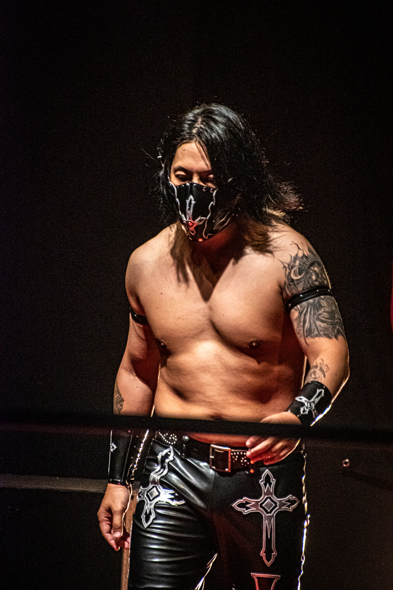 プロレスラーのHellbros Ryu